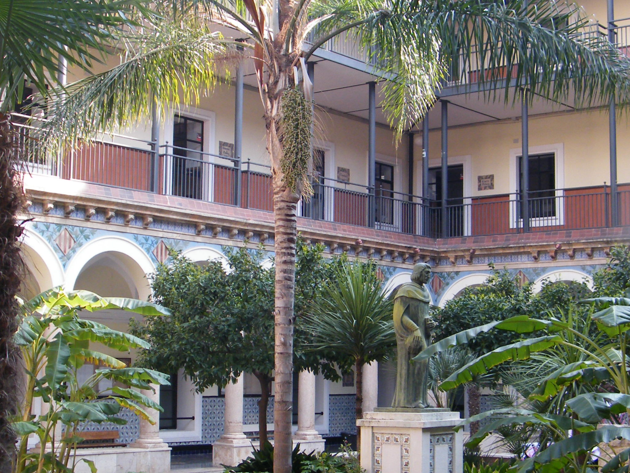 Vista del patio interior (antiguo claustro) con la estatua de Juan Luis Vives. Instituto de Enseñanza Secundaria Luis Vives de Valencia.